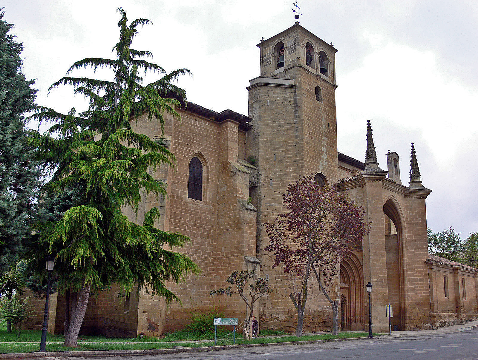 Iglesia de la Santa Cruz, Bañares - La Rioja - España.